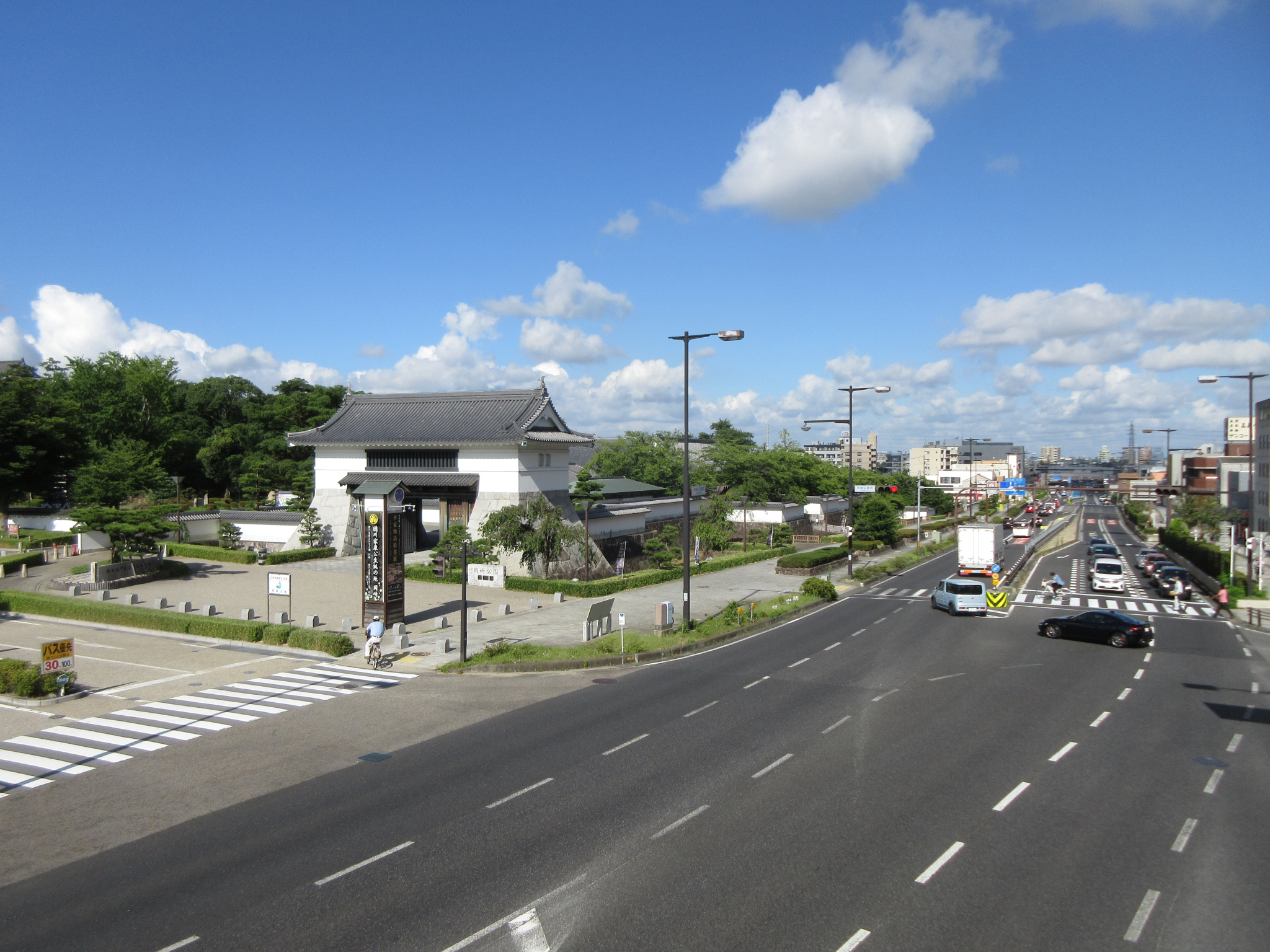 国道1号。愛知県岡崎市康生通西にて。